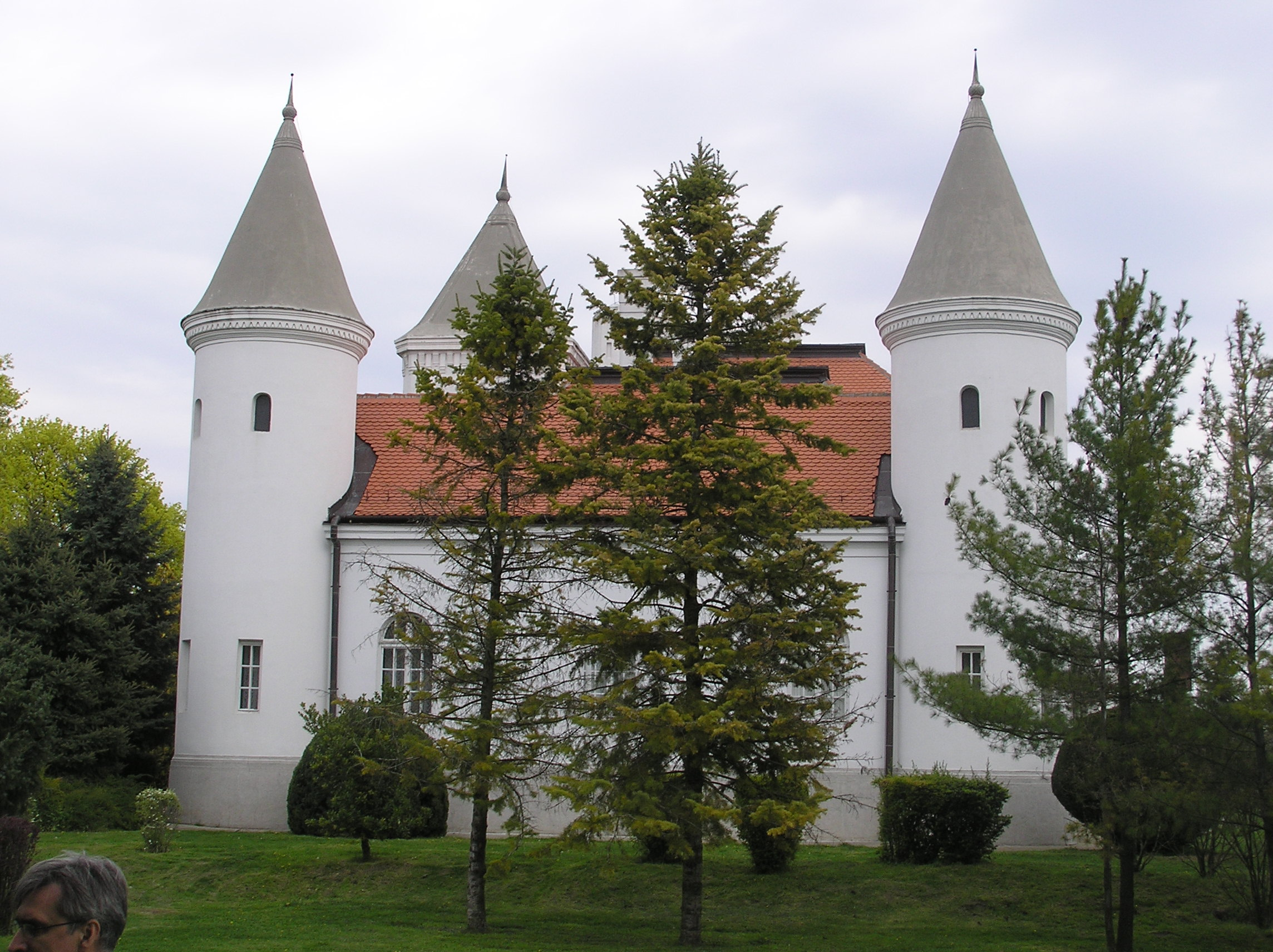 Дворац Фантаст у атару Бечеја